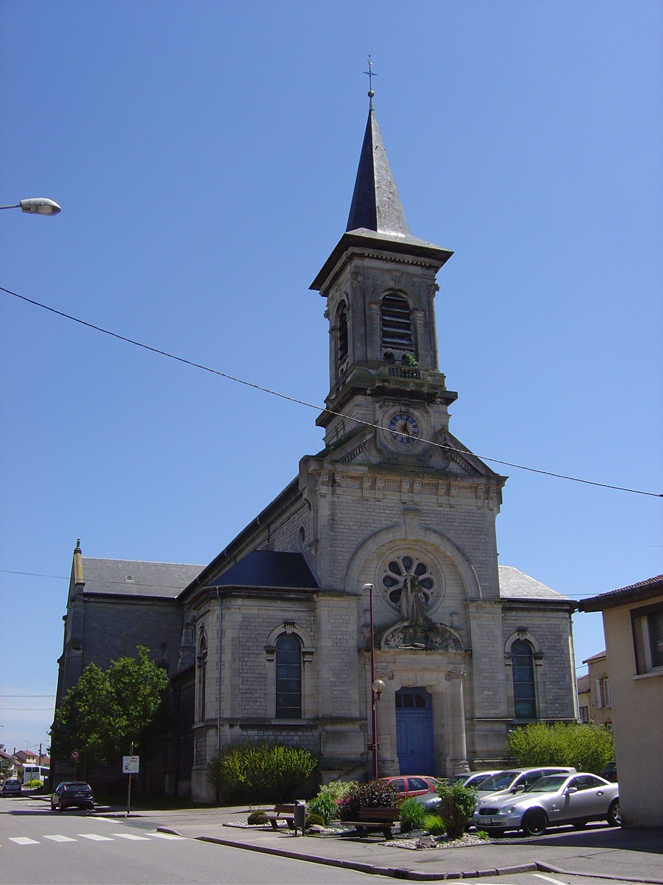 Église Saint-Basle de Dombasle-sur-Meurthe. Construite à partir de 1897 d'après les plans de l'architecte J.-Charles-Marcel Berger (1867-1905), élève de Guadet.